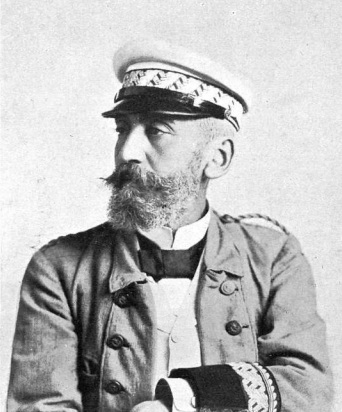 El_ministro_de_la_Guerra,_general_Luque. Obra del fotógrafo Kaulak.